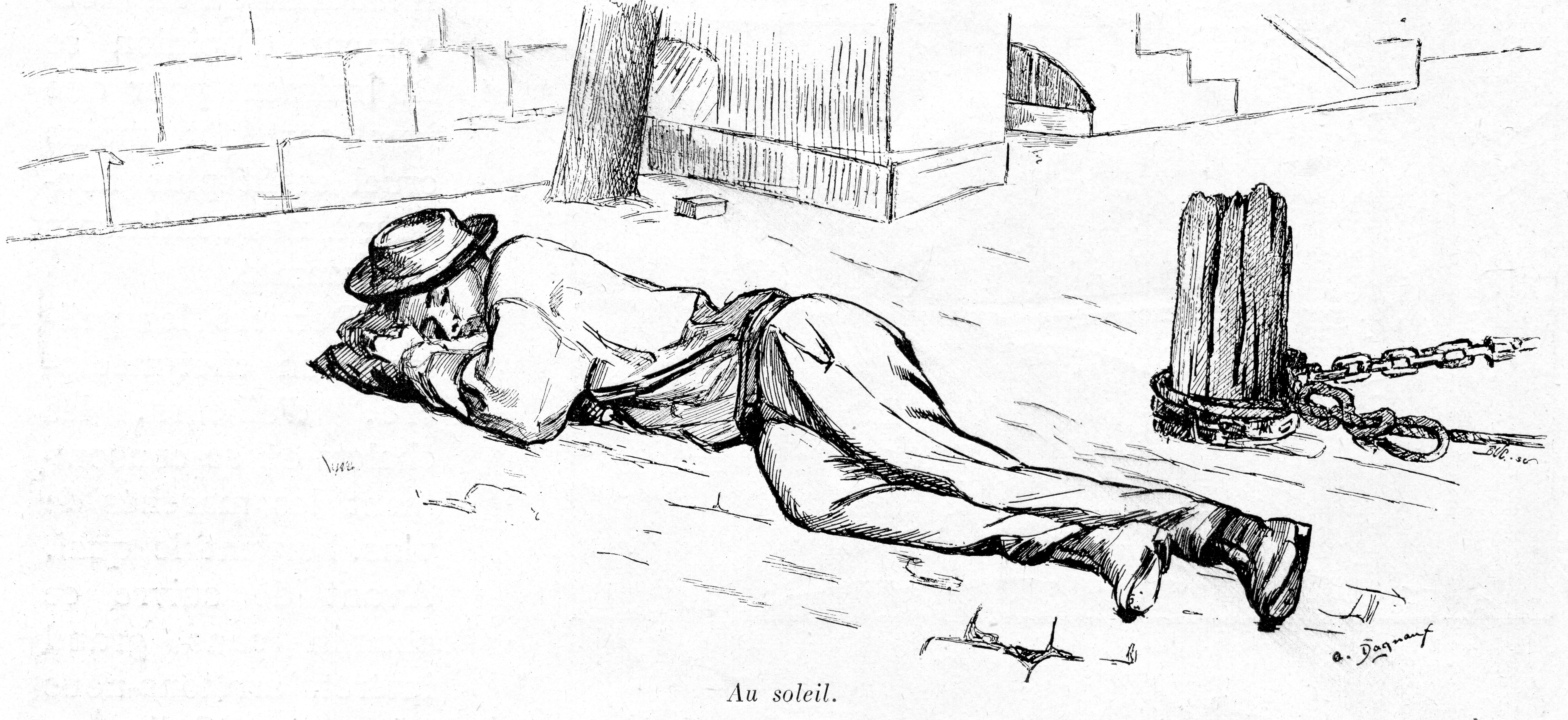 Au soleil, dessin d'A. Dagnaux (Paris en plein air, BUC, 1897)